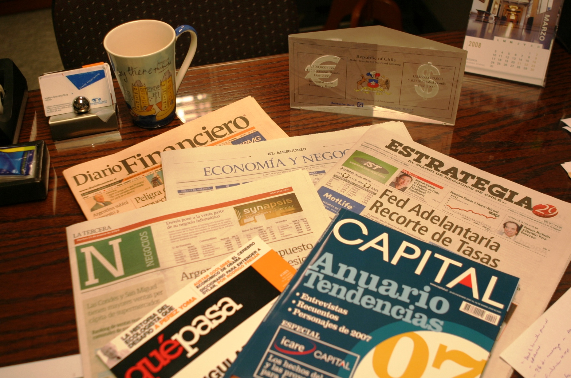 Prensa económica chilena